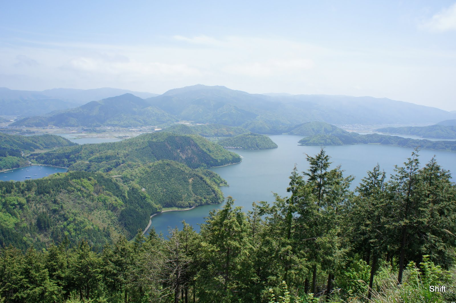 [福井県] 三方五湖をレインボーラインから眺める。天気も快晴に。この道は素晴らしいですね。左右に広がる海と景色、ビューポイントもたくさんあって、駐車場も整備されていて、見る場所ごとに景色が変わります。